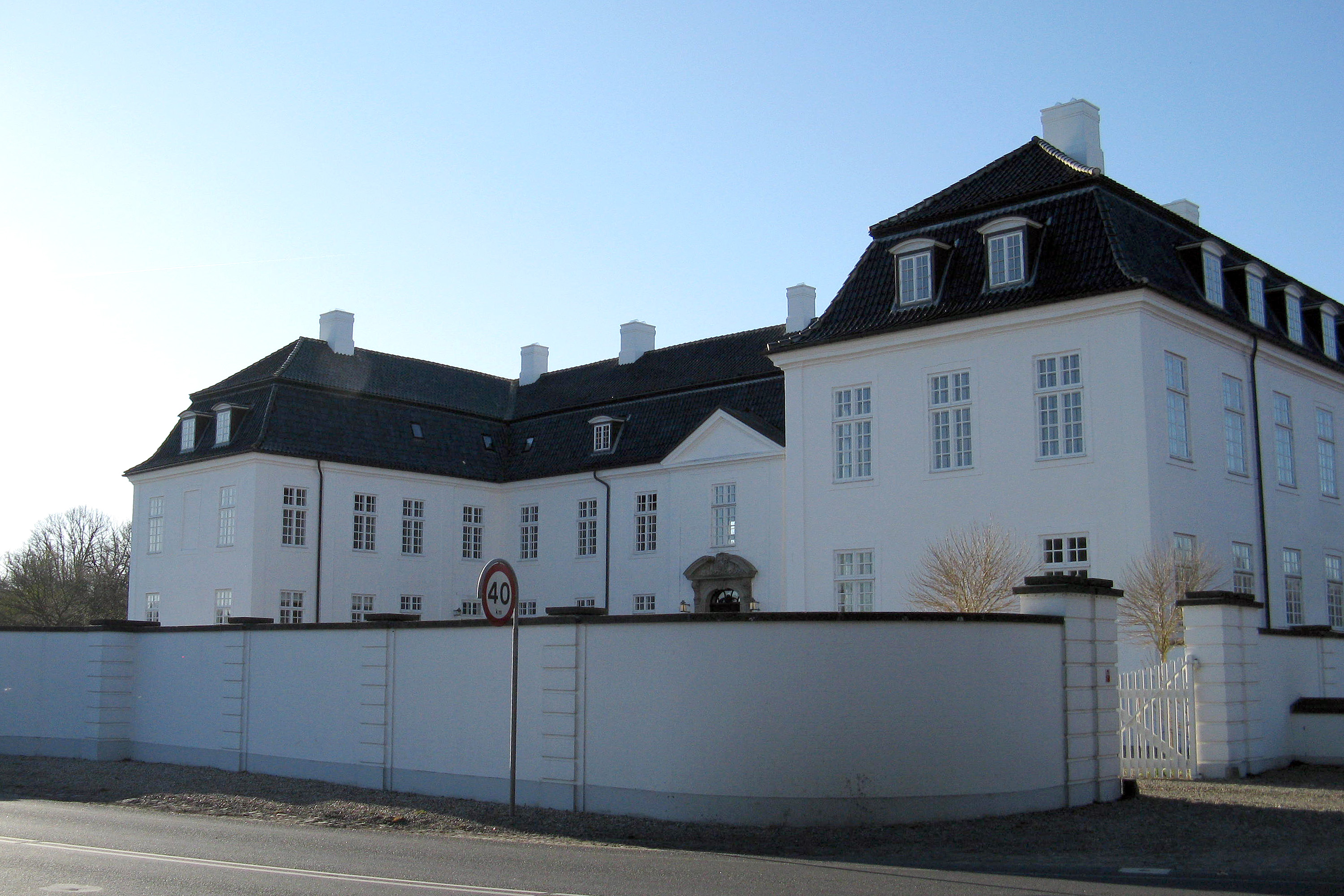 Hvidkilde er en herregård i Egense Sogn, Sunds Herred, Svendborg Kommune på Fyn (Denmark).